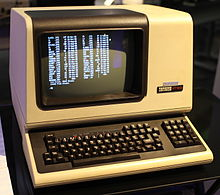 Монгол: Ягболно